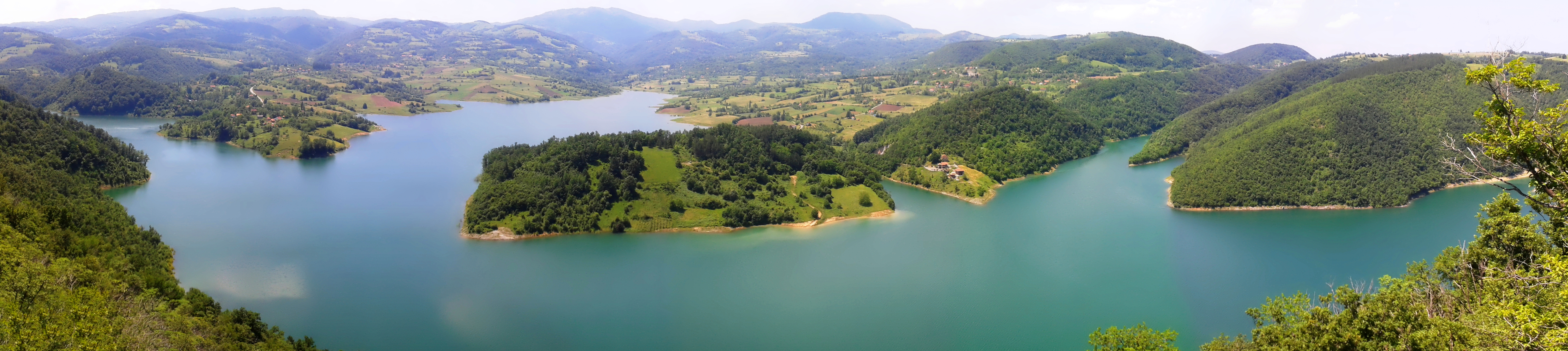 Ровни језеро панорама